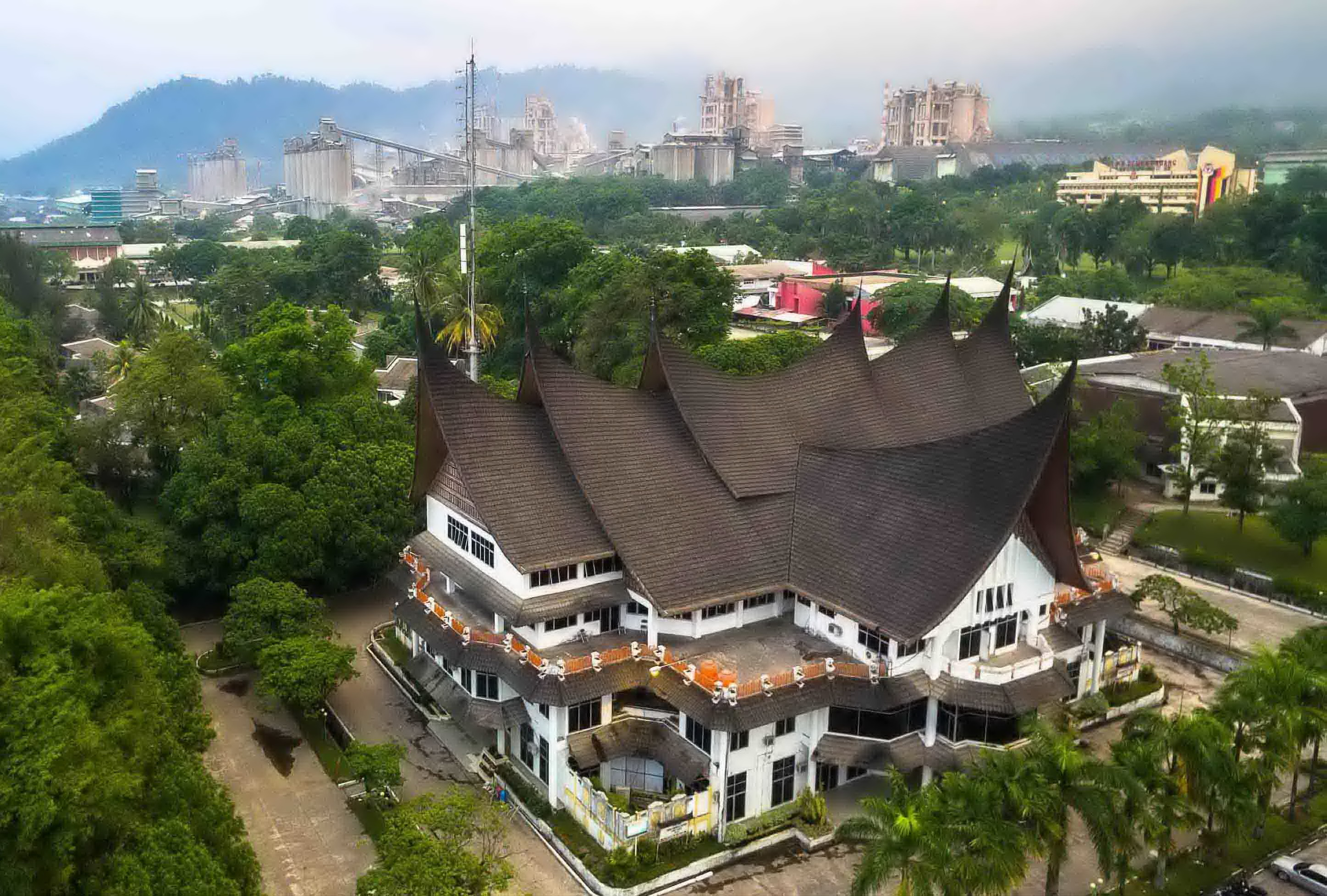 Gedung Serba Guna PT Semen Padang